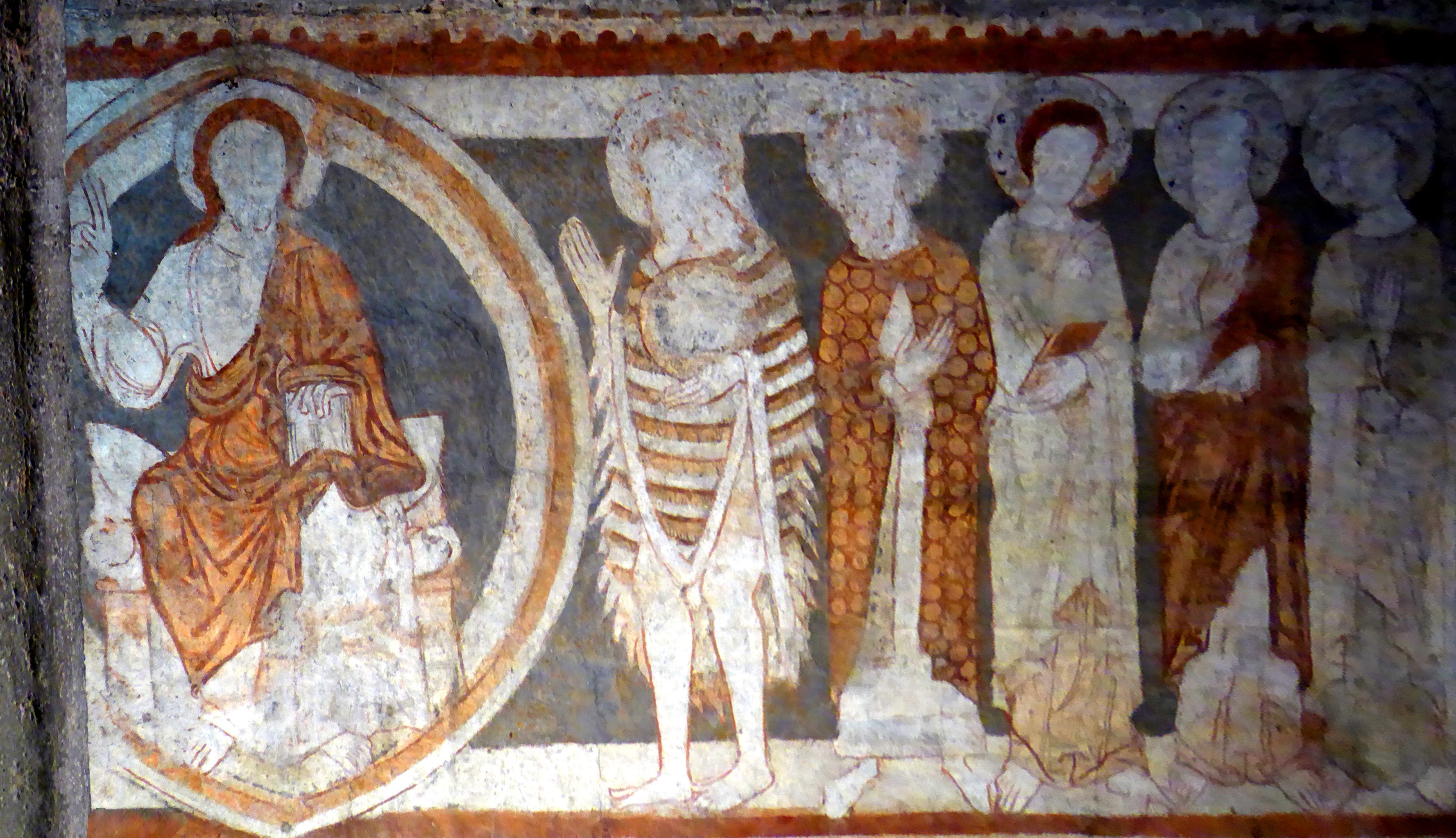 Fresko im Riesentor des Stephansdoms in Wien, um 1240, Christus in der Mandorla mit Johannes und anderen Heiligen.